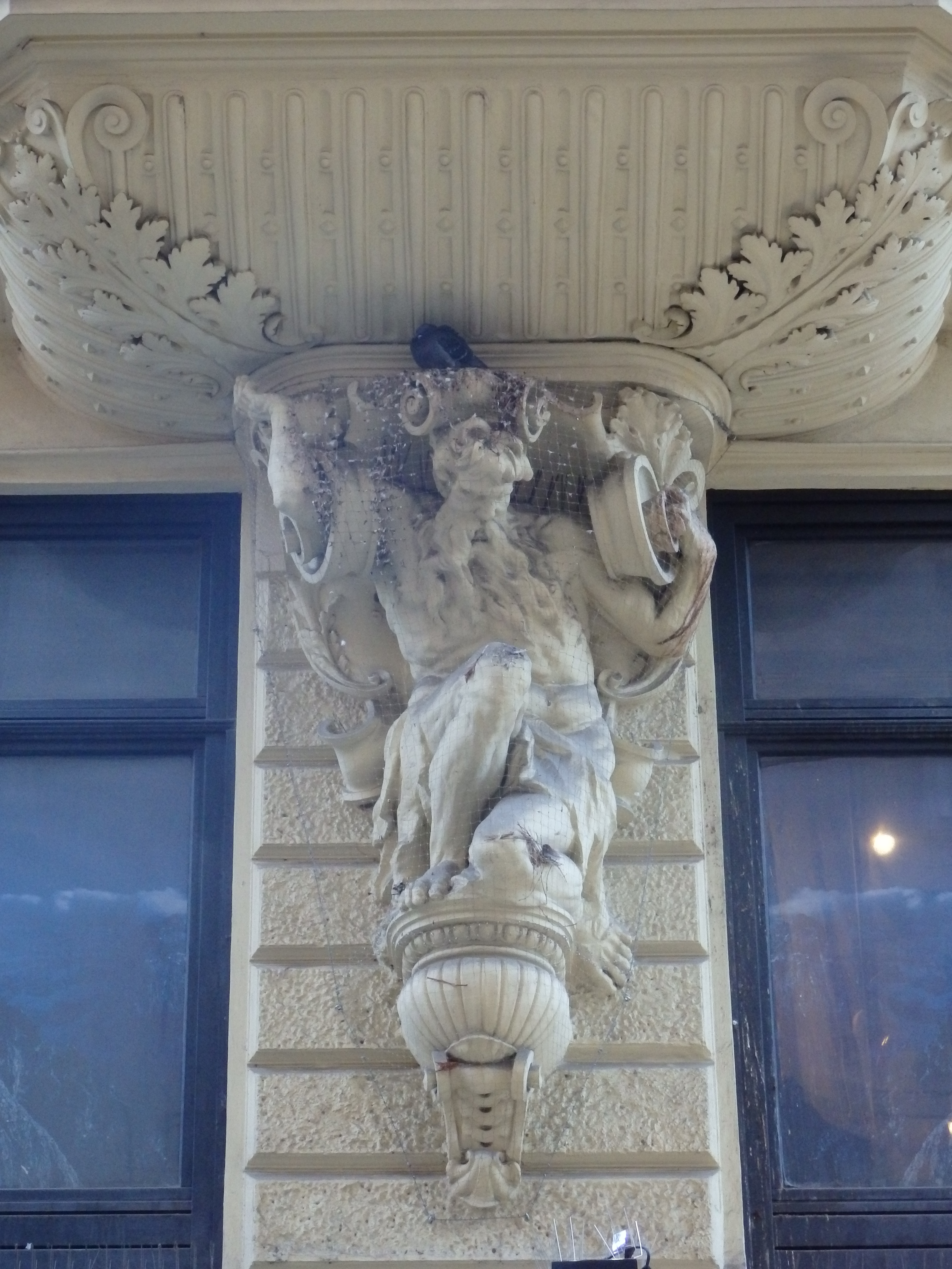 Wohn- und Geschäftshaus (1881) von Hermann Helmer und Ferdinand Fellner, Detail, Goldschmiedgasse 4, Wien-Innere Stadt